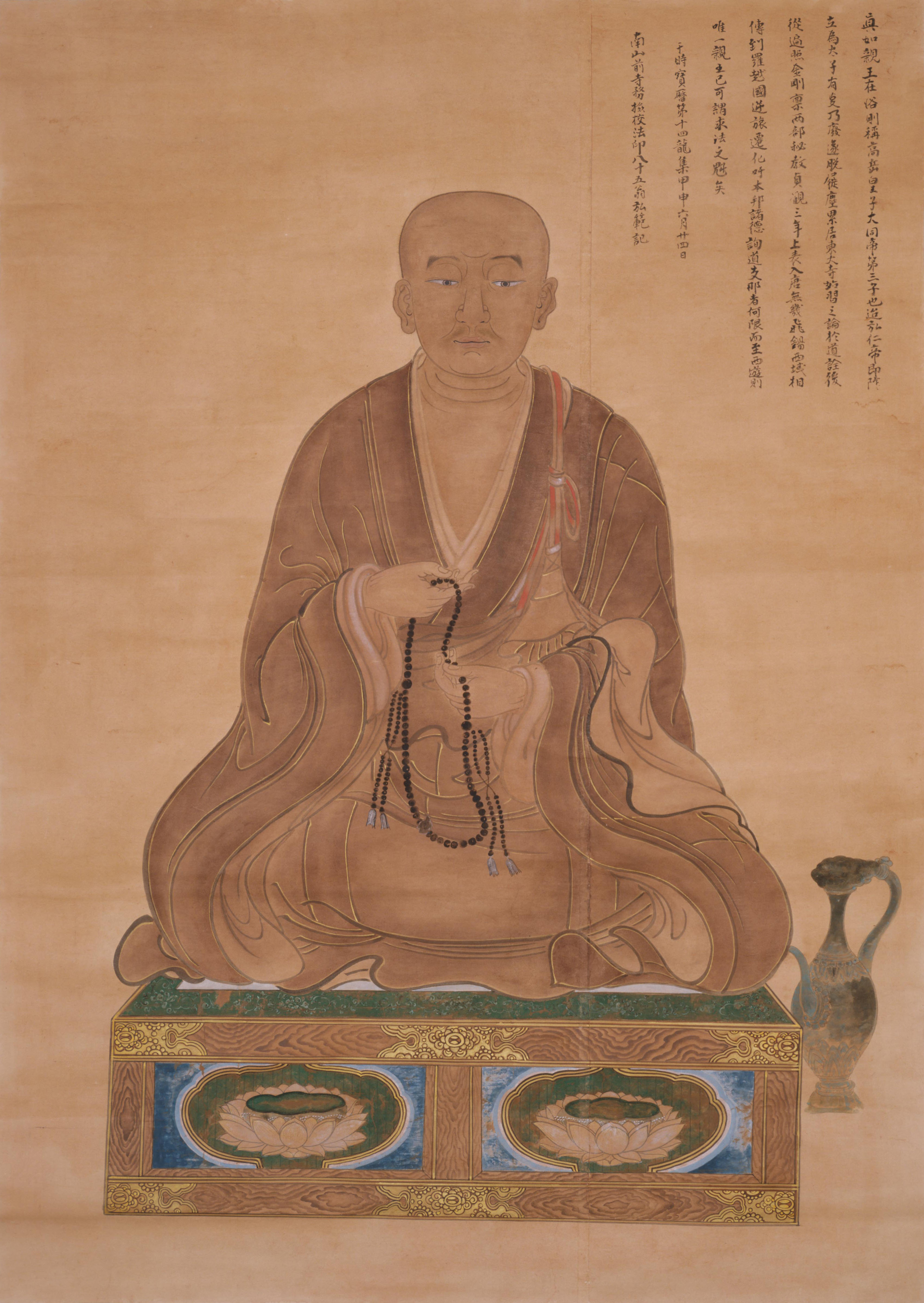 高丘(真如)親王の肖像(複製)。